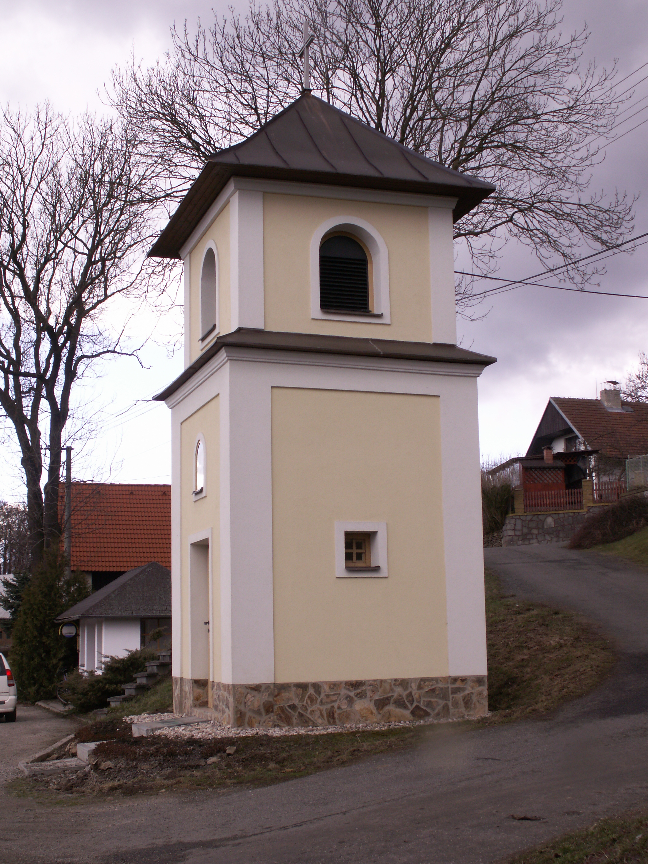 kaple sv. Václava, Kundratice, okres Žďár nad Sázavou